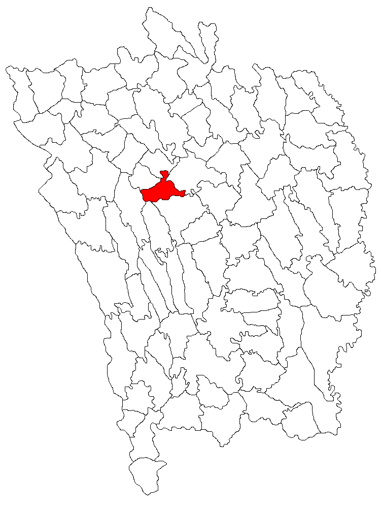 Categorie:Hărţi ale judeţului Vaslui